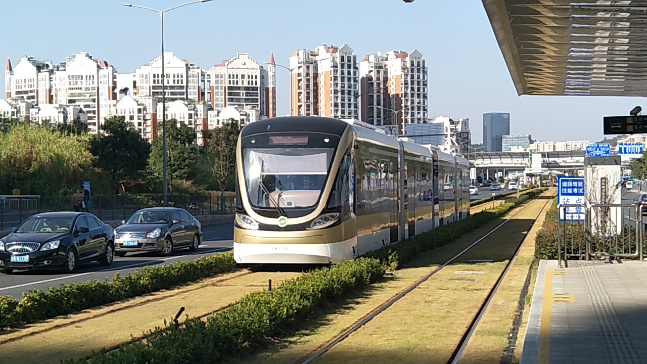 深圳有轨电车往清湖方向列车驶入文澜站，位于龙华区